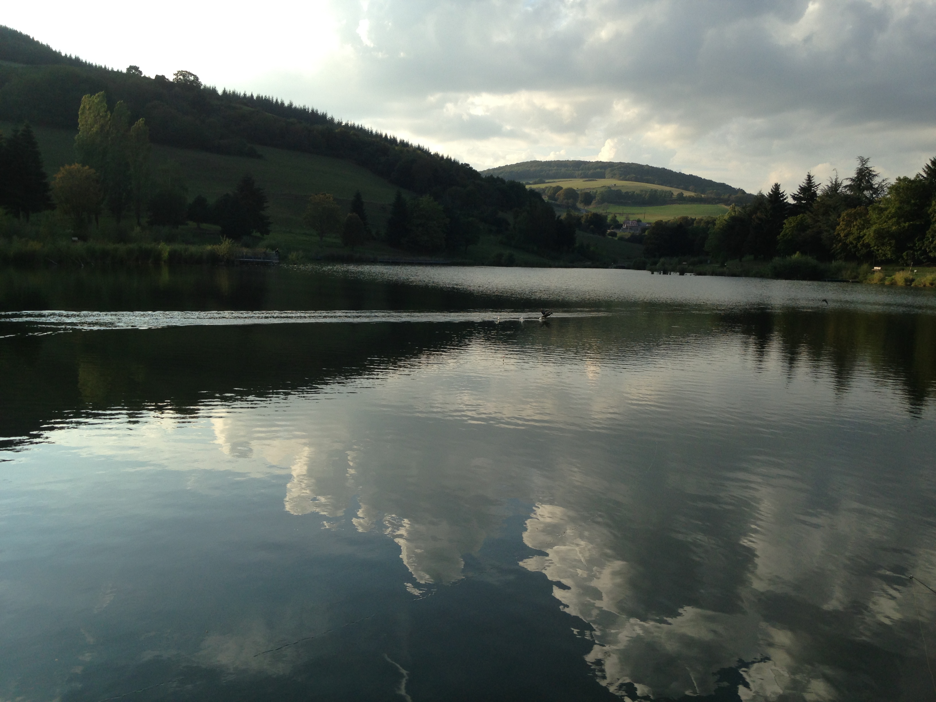 Cadre idéal de promenade et de pêche